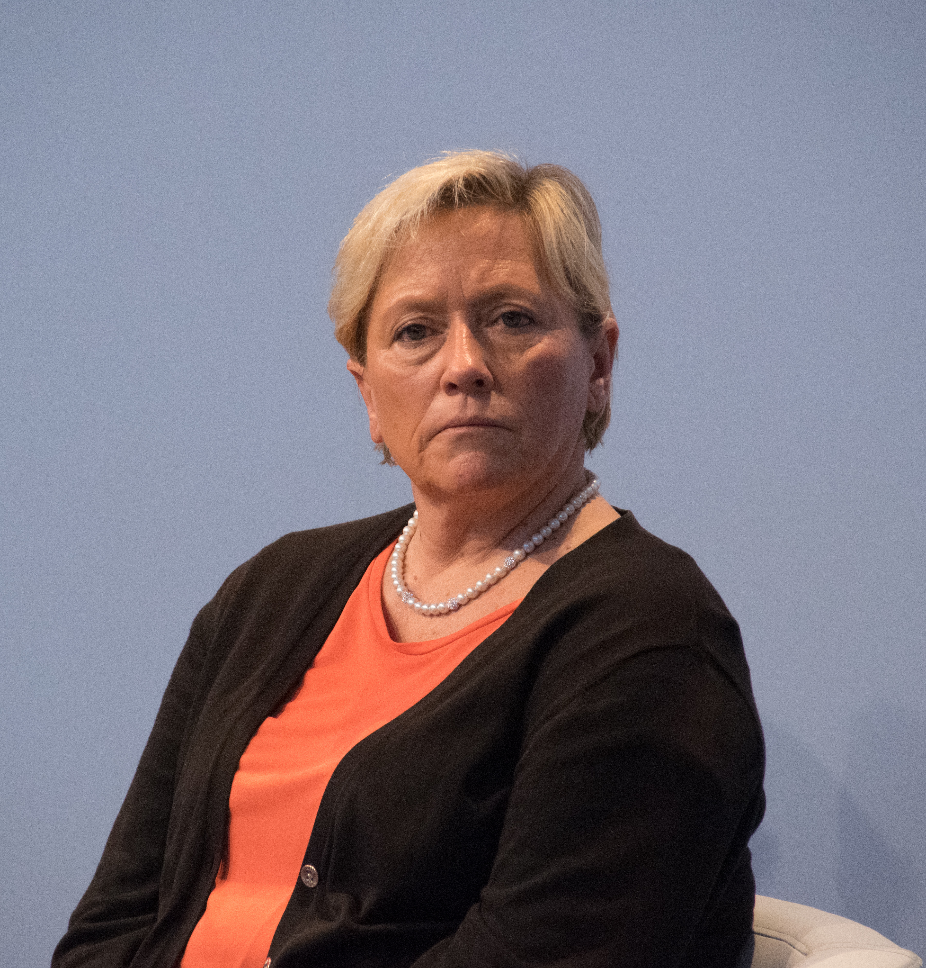 DIDACTA 2017 in Stuttgart, Susanne Eisenmann, Ministerin für Kultus, Jugend und Sport in Baden-Württemberg